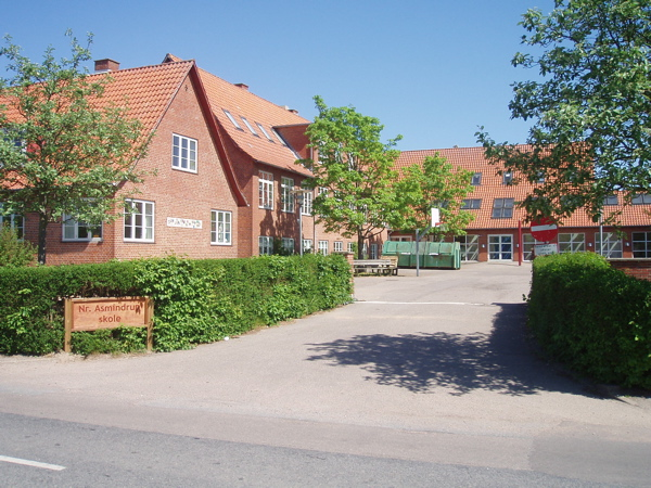 Nørre Asmindrup Skole.